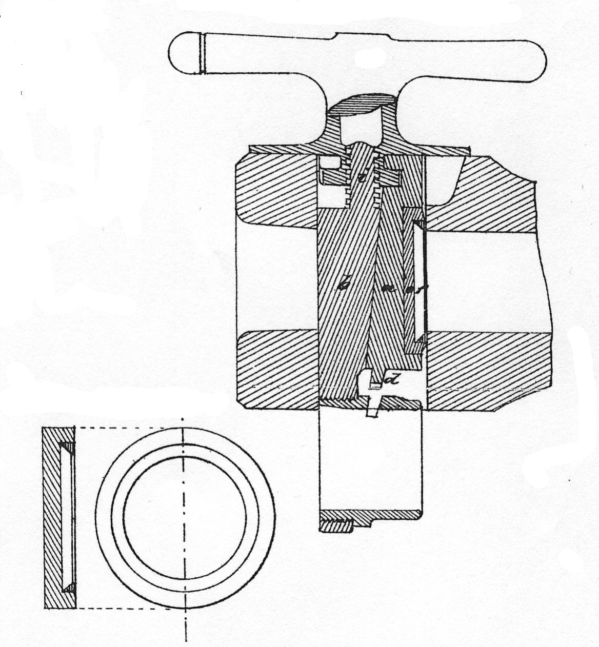 Schnittzeichnung des Doppelkeilverschlusses einer C/64